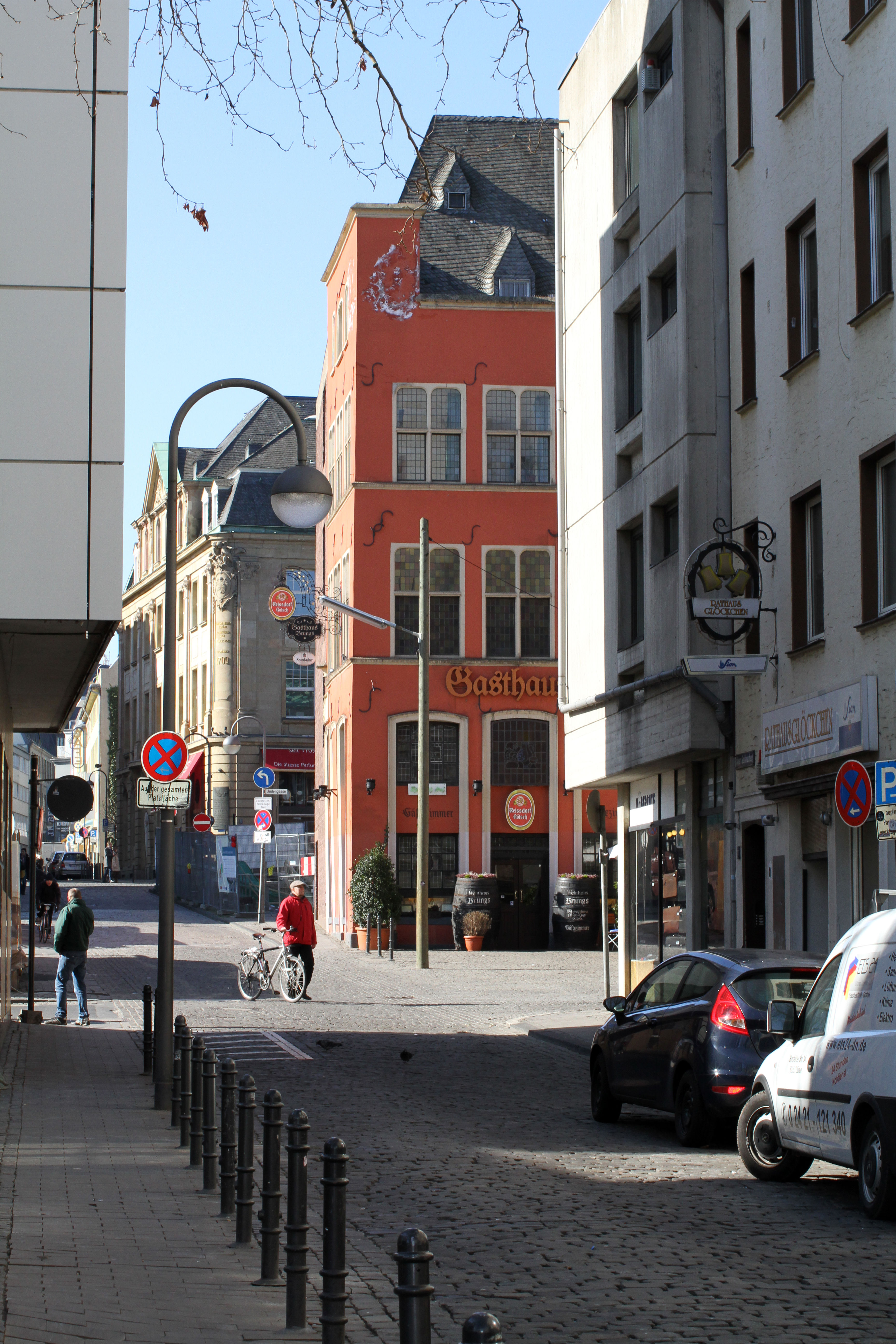 Köln, Blick in das Seidmacherinnengäßchen (ehemals Unter Seidmachern), in Richtung Marsplatz und Obenmarspforten